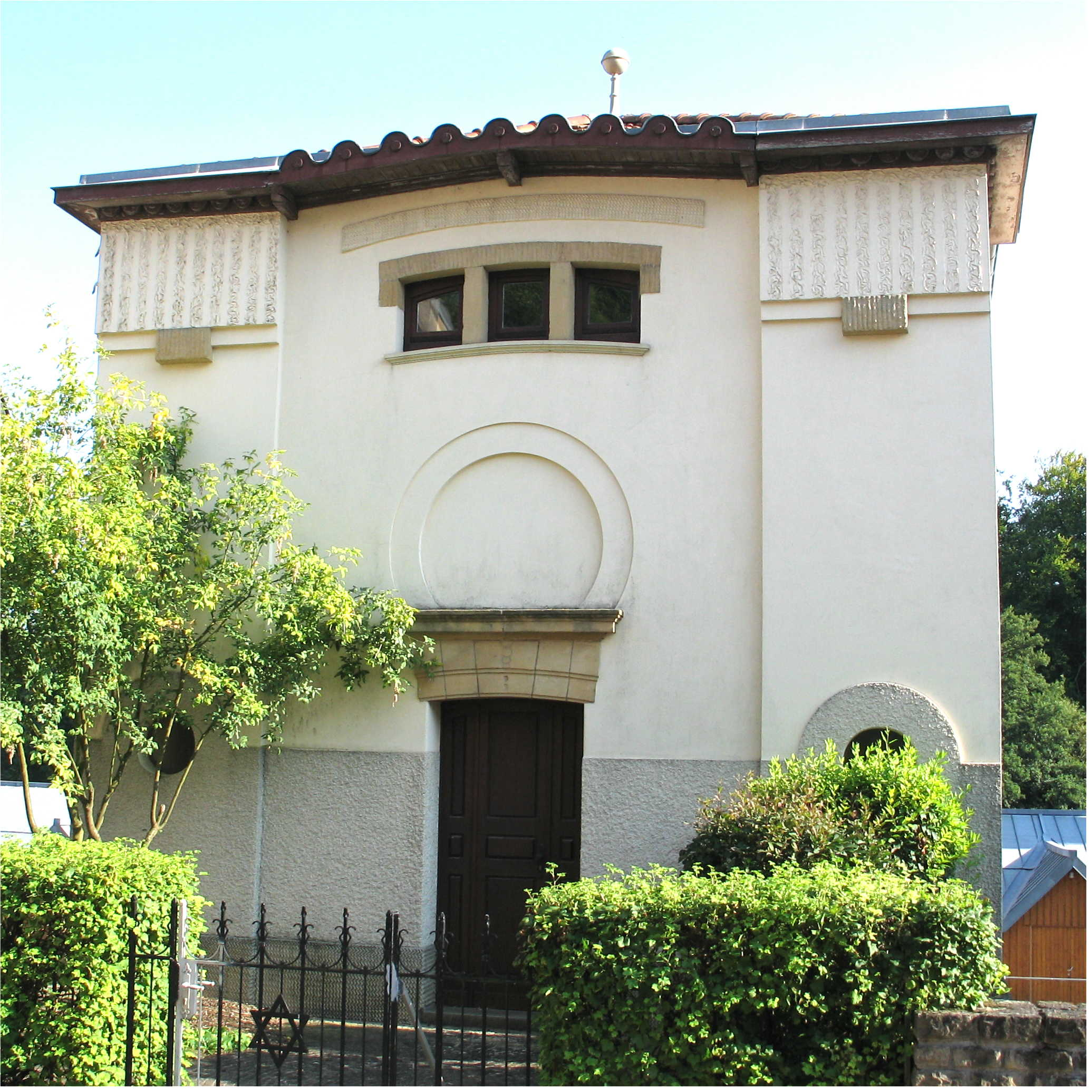 Synagog zu Munneref. Kategorie:Gemeng Munneref Munneref